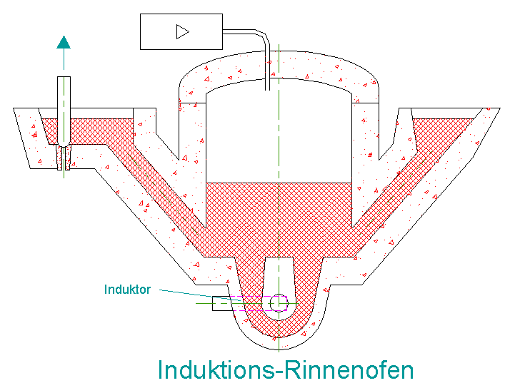 Schematische Darstellung Rinnenofen